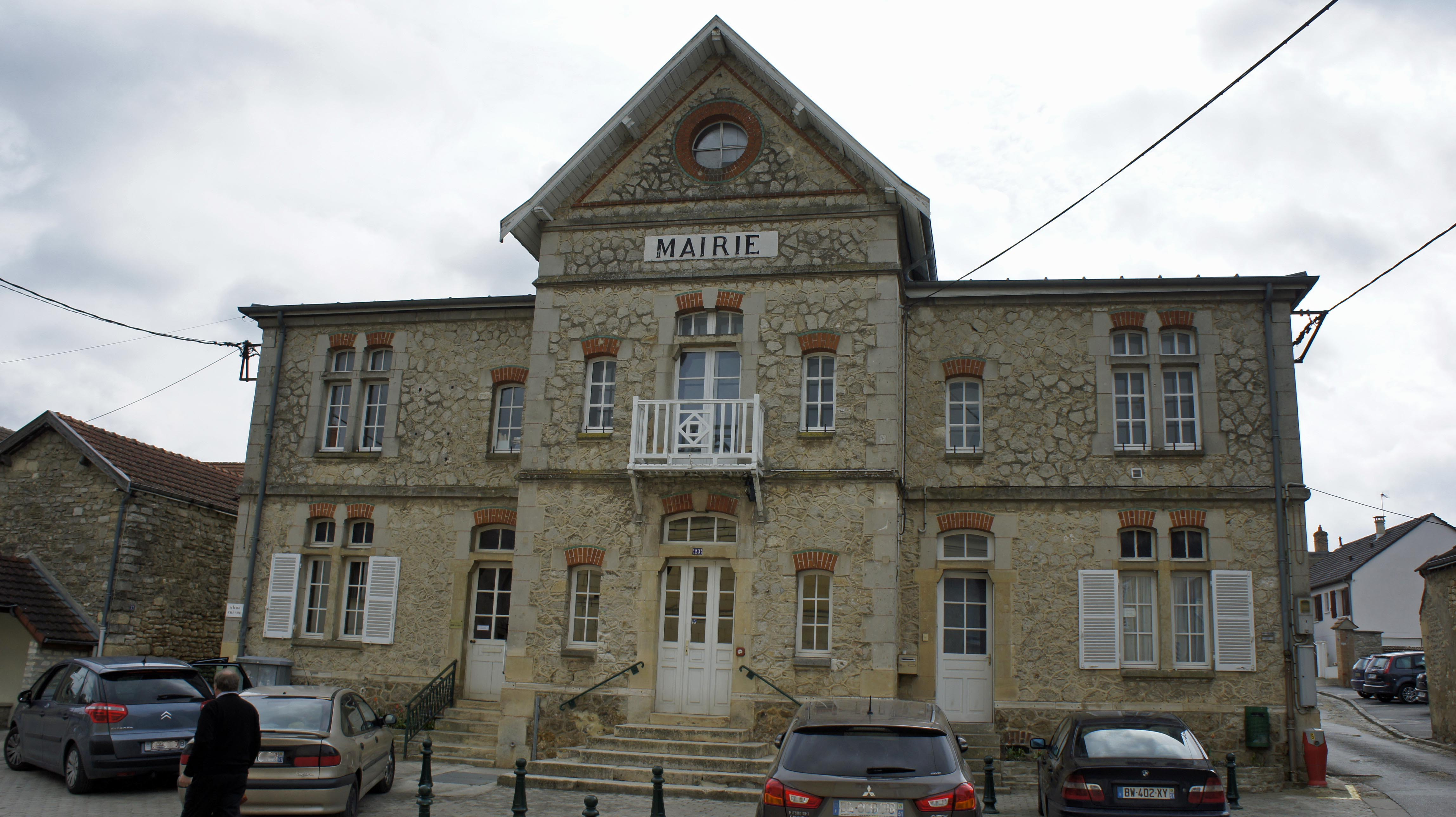 Mairie de Prouilly.